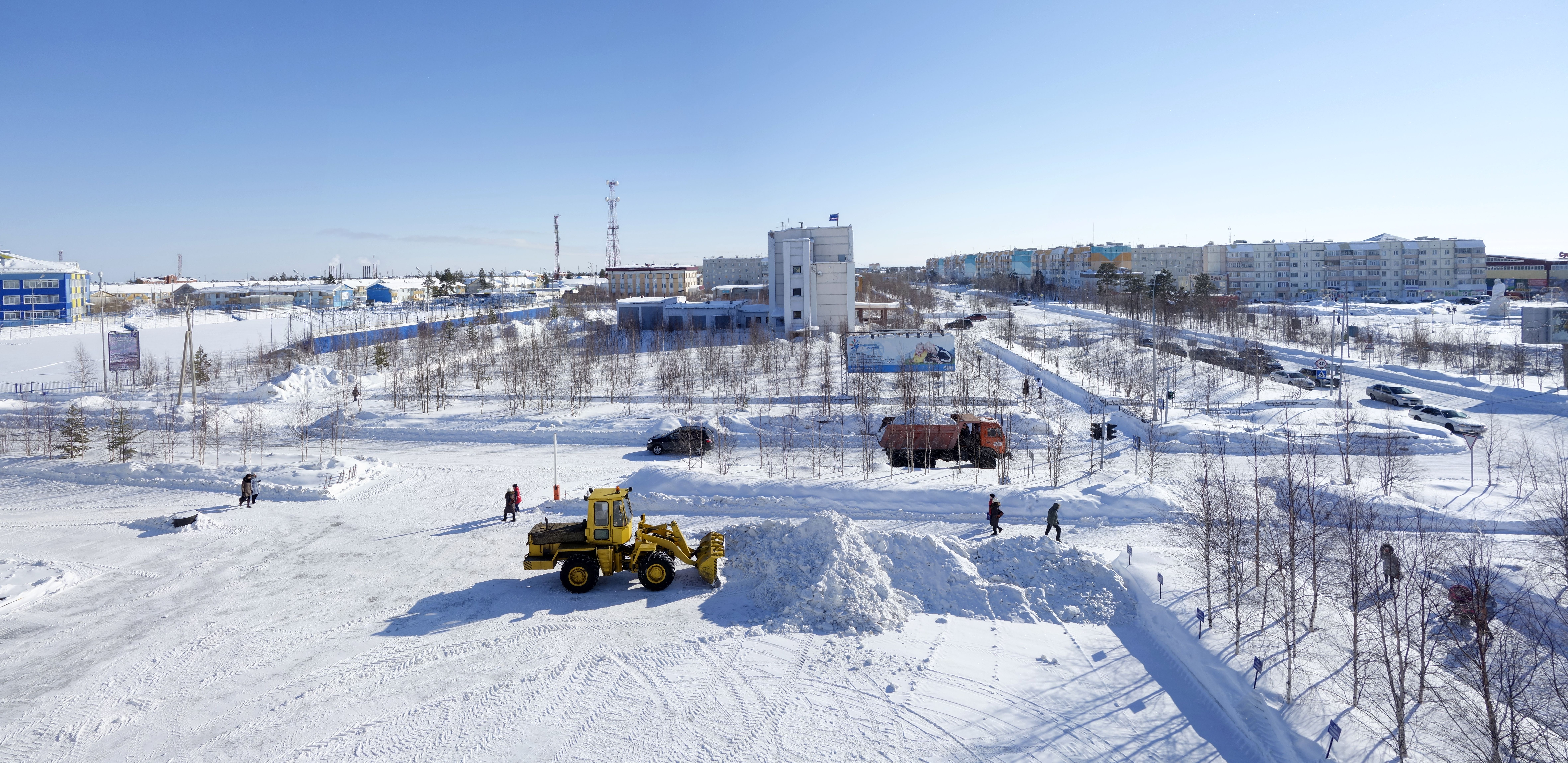 Муравленко март 2014